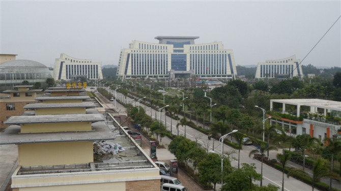 Bâtisses gouvernementales de Qinzhou